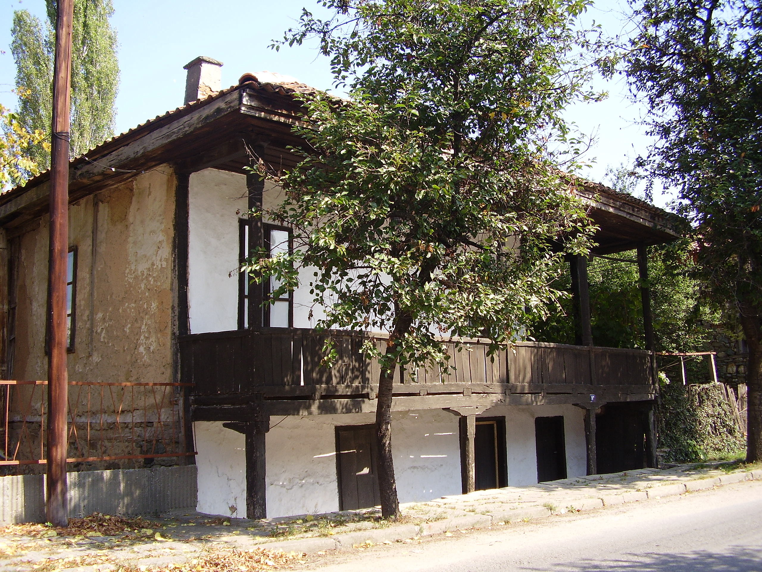 с.Соволяно